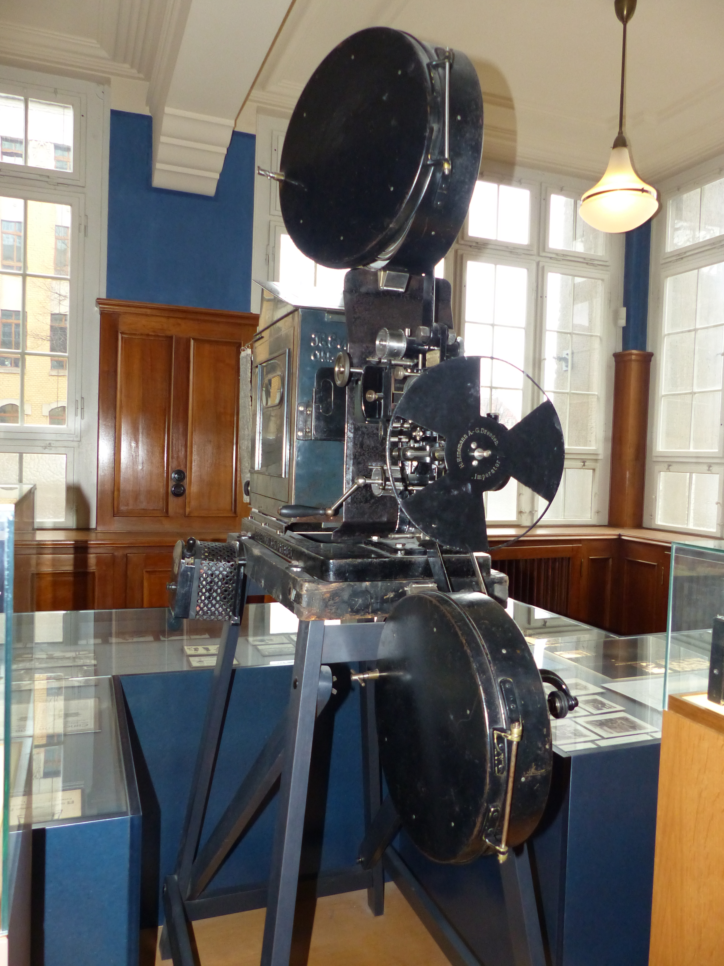 Filmprojektor Imperator, um 1910, Ernemann AG; Exponat in den Technischen Sammlungen Dresden